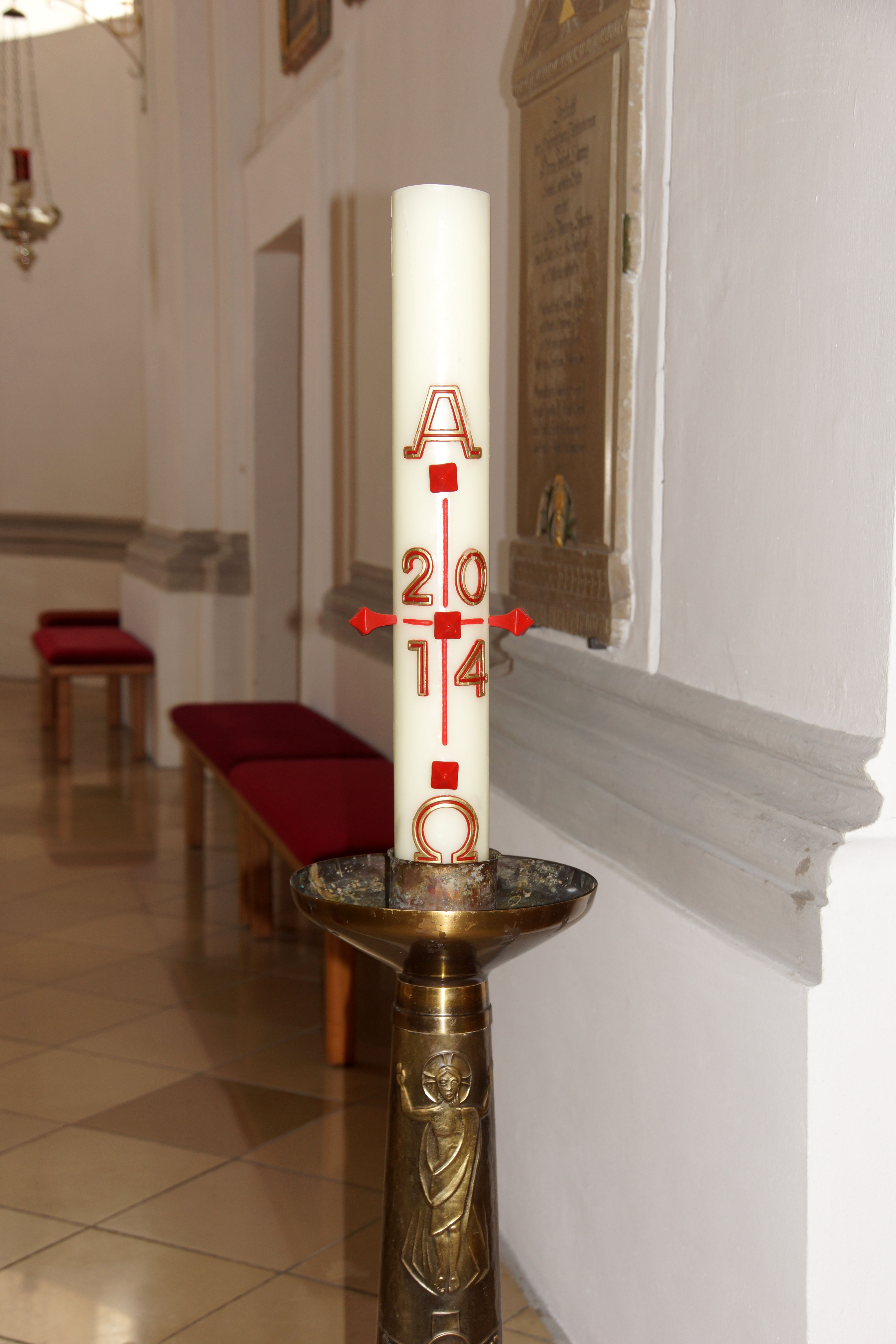 Die katholische Pfarrkirche St. Peter und Paul im Oberpfälzer Markt Schierling